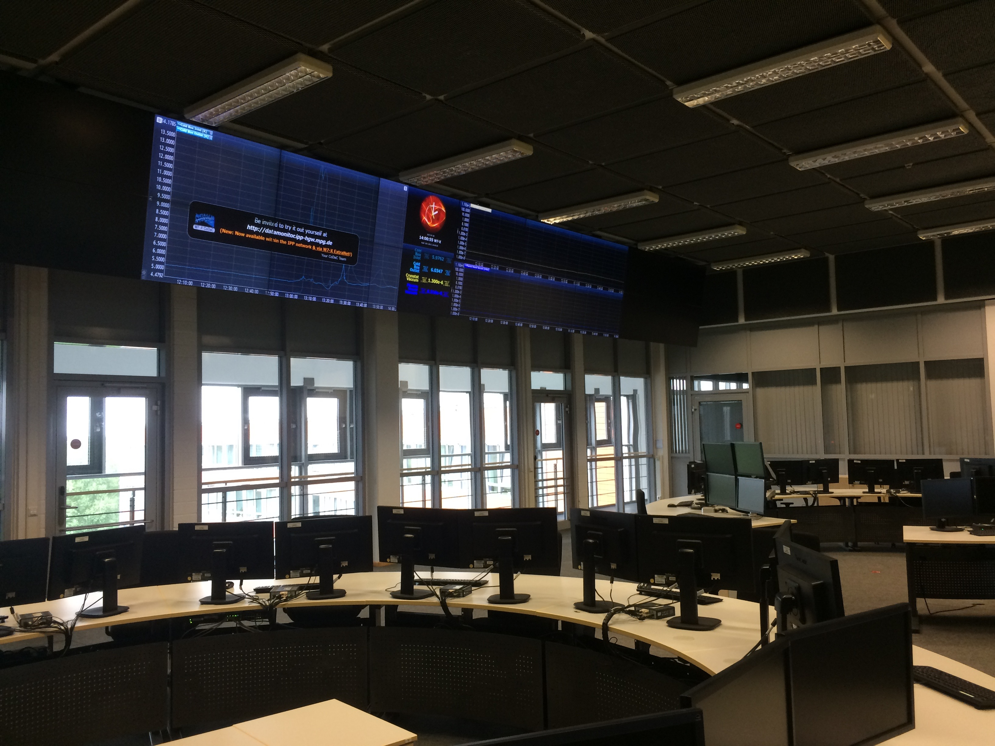 Wendelstein 7-X, Steuerzentrale, Testlauf